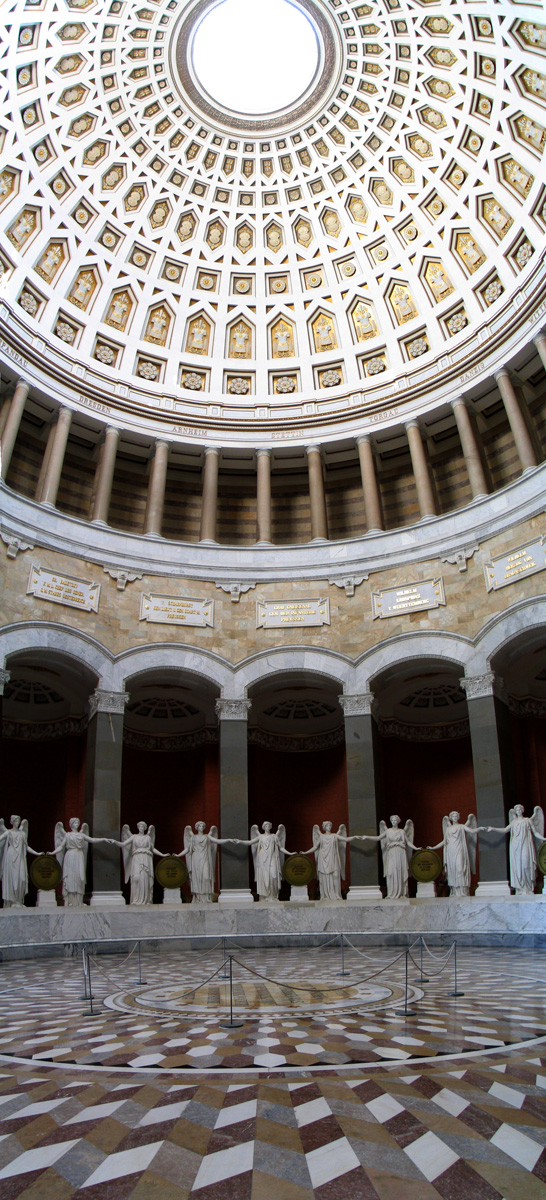 Innenaufnahme Befreiungshalle Kelheim, Bayern, Deutschland / Interior Befreiungshalle Kelheim, Bavaria, Germany